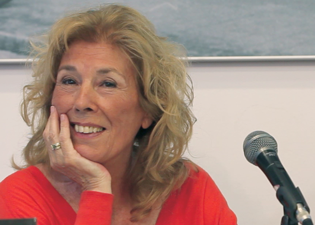 Retrat de Mercedes Fernández-Martorell